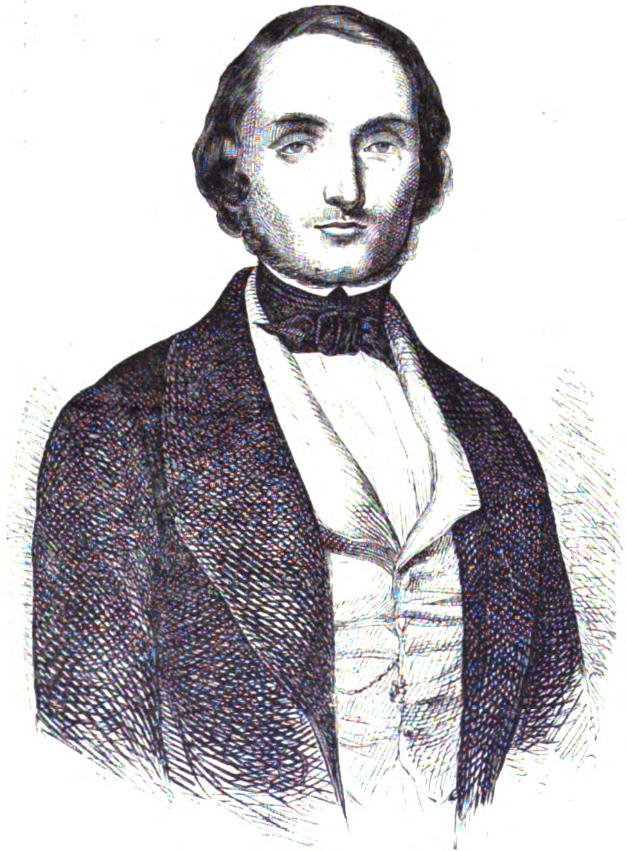 Cesare Cantu, Gelehrter und Schriftsteller aus der Norditalien.